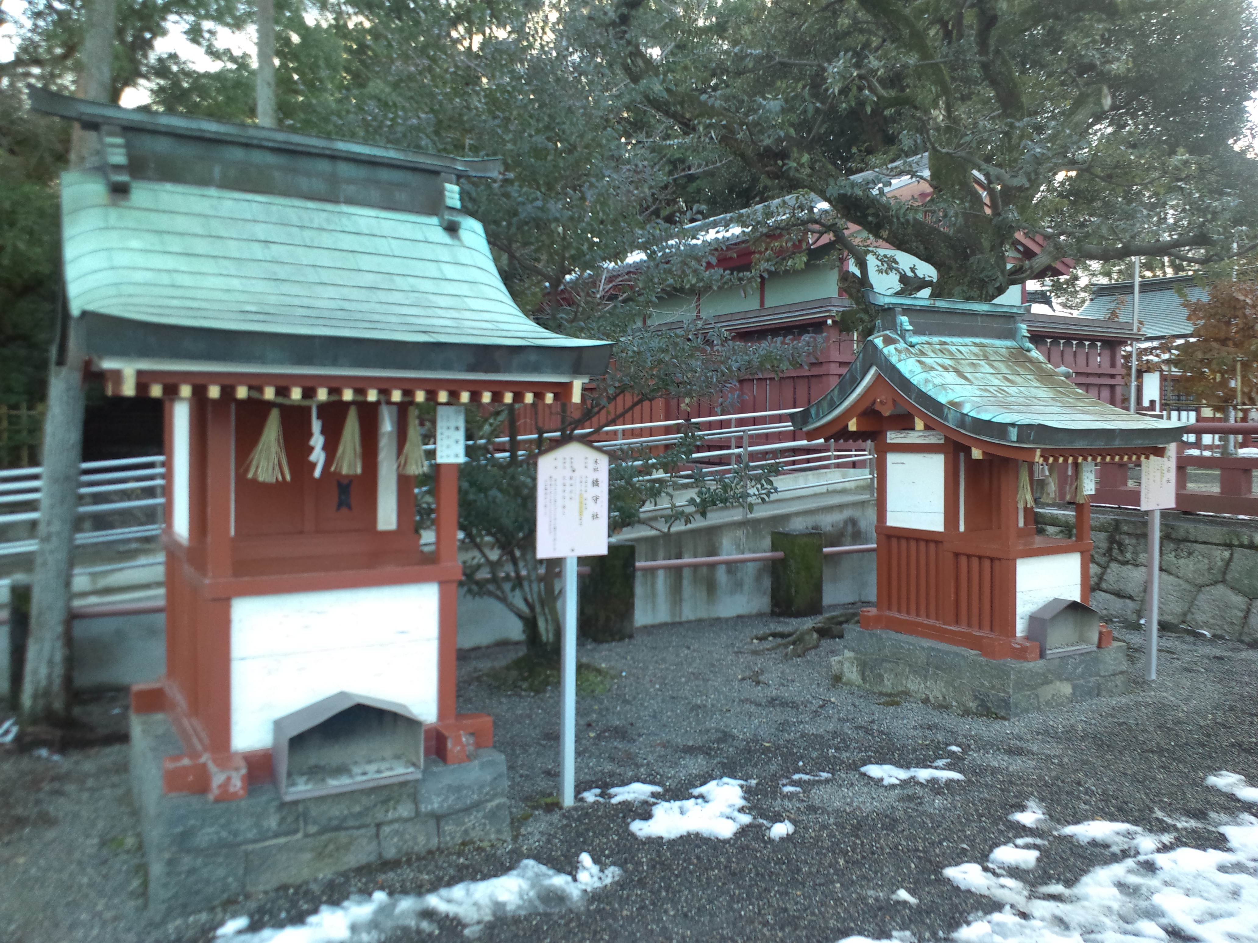 津島神社 末社